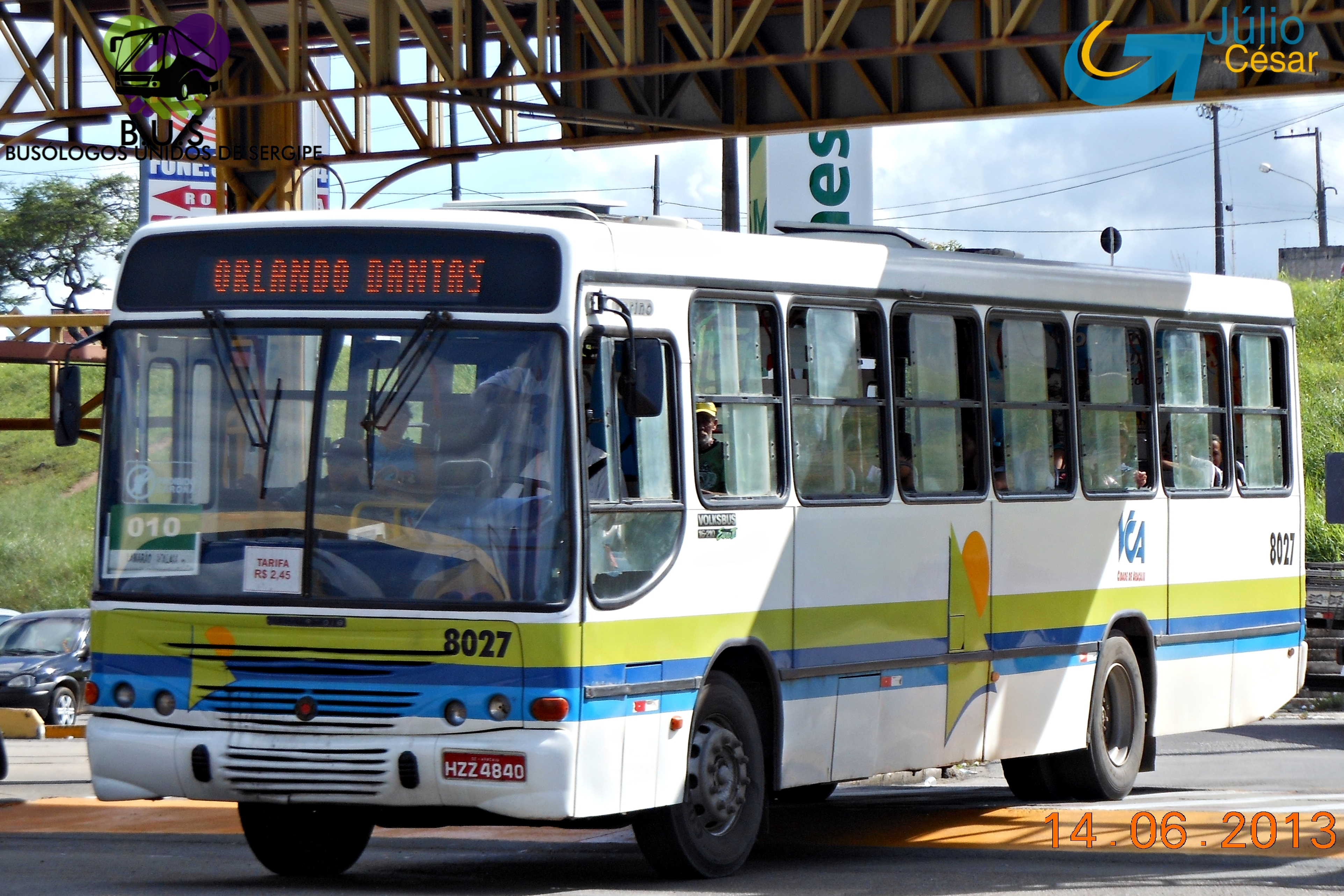 Torino 99 da Viação Cidade de Aracaju(extinta) em Aracaju-SE